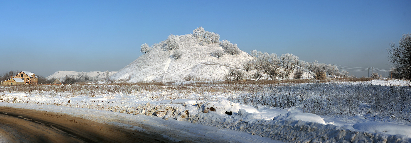 у Забытого террикона